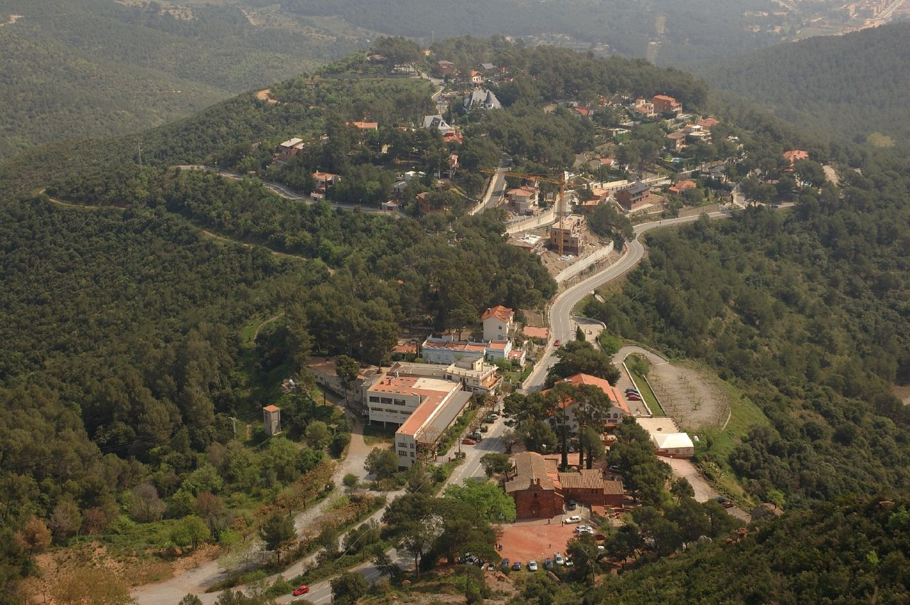 Bruguers, sobre Gavà